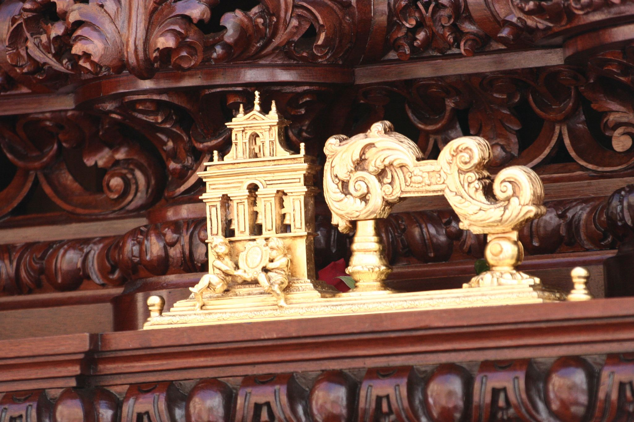 El "llamador". Semana Santa en Sevilla. Año 2006 Foto realizada y propiedad de Ángel Cachón